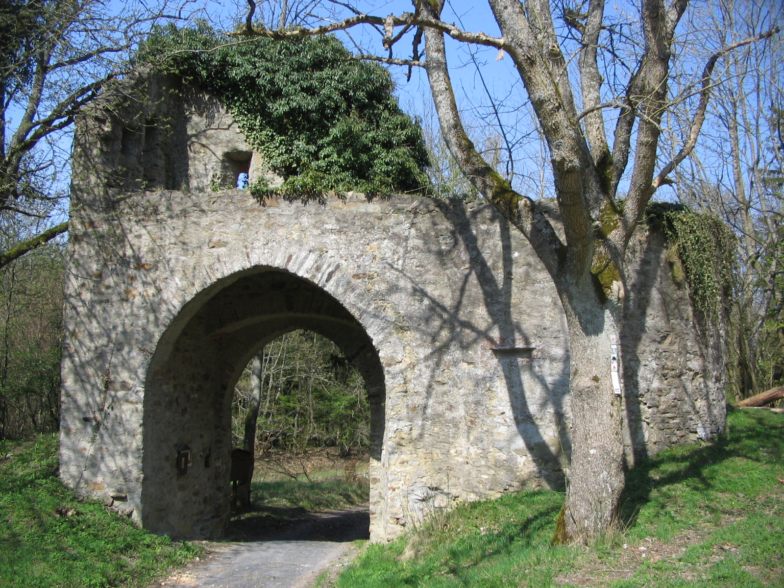 Die 1494 erbaute Mapper Schanze ist das einzige noch erhaltene Bollwerk des Rheingauer Gebücks an der Straße von Oestrich am Rhein nach Geroldstein an der Wisper